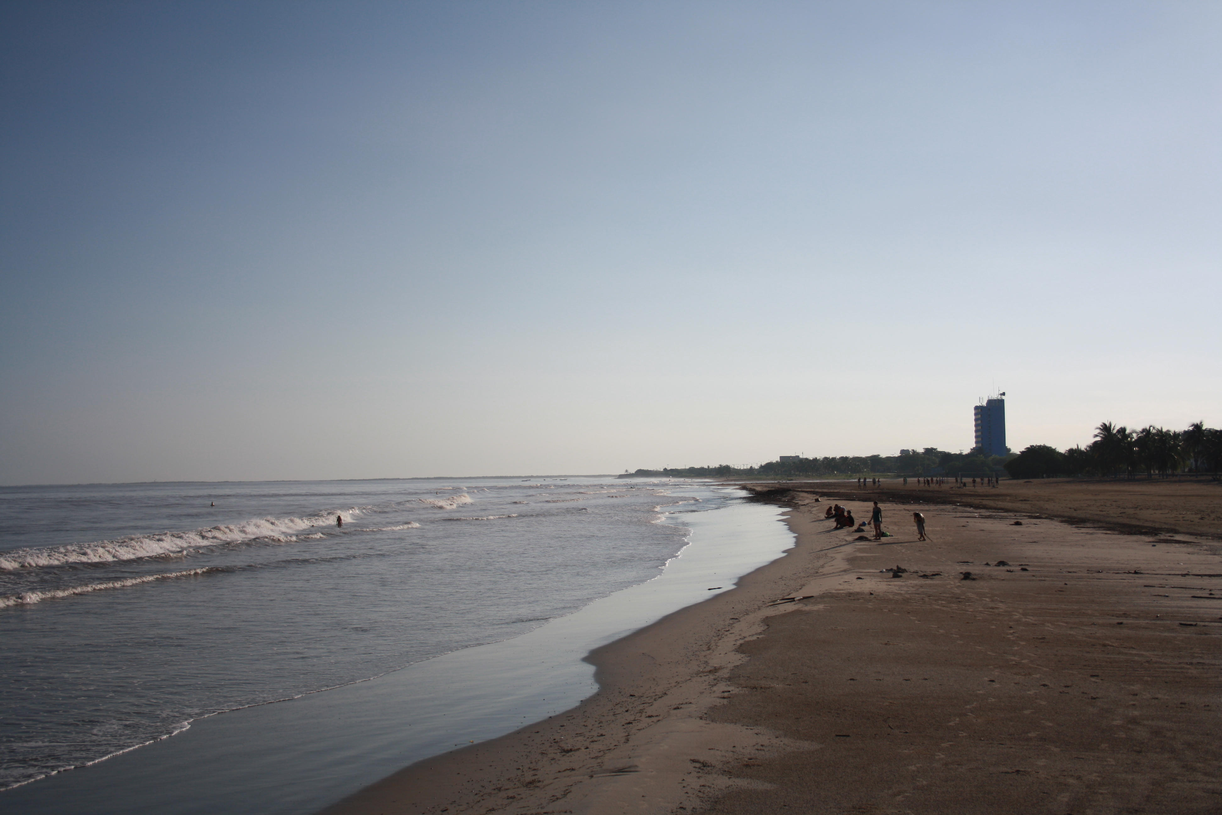 Playa tranquila, al fondo edificio Mar Azul (Guajira)